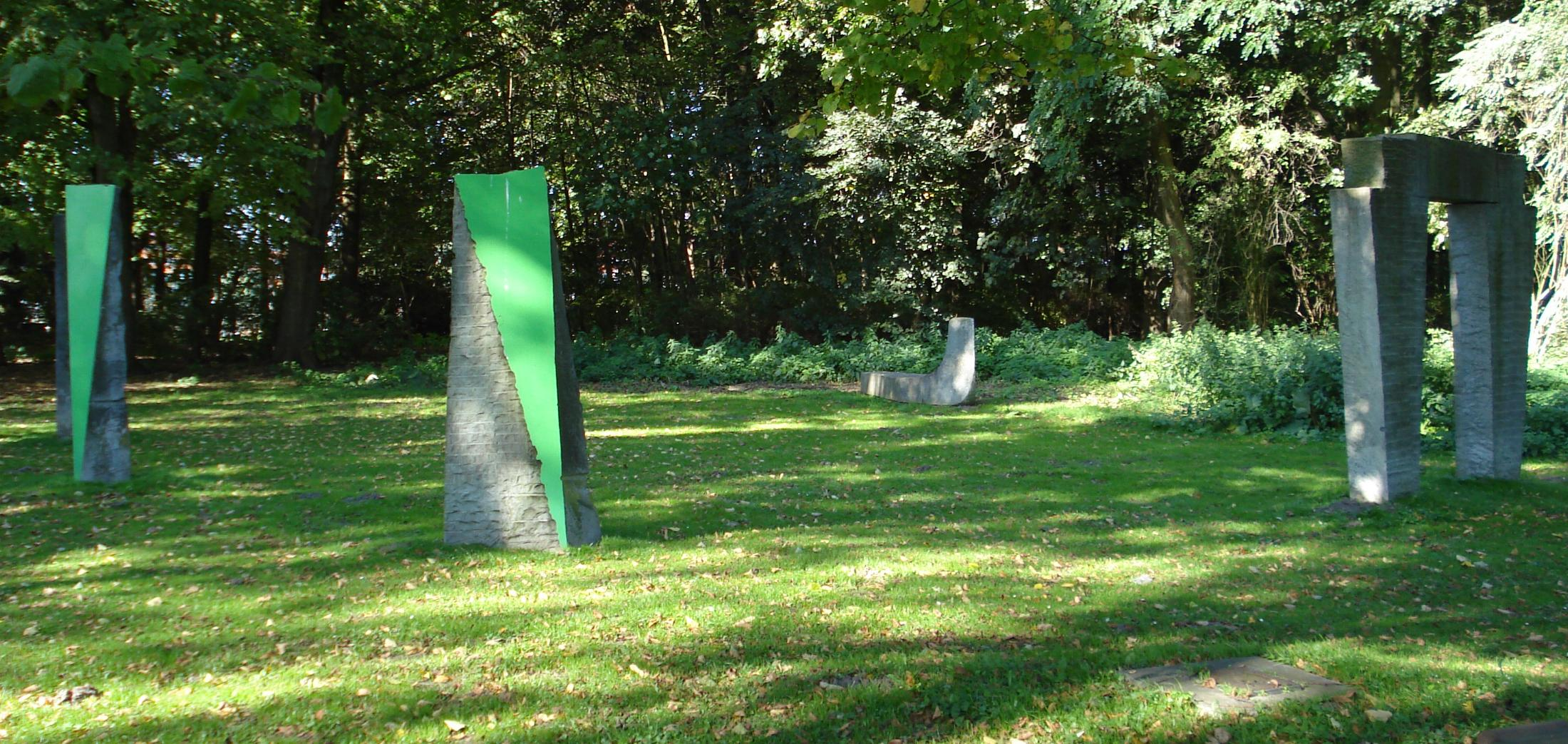 Beeldenpark Zwijndrecht. Kunstwerk "Fragmenten" van Lukas Arons. Zwijndrecht/The Netherlands. FOP.